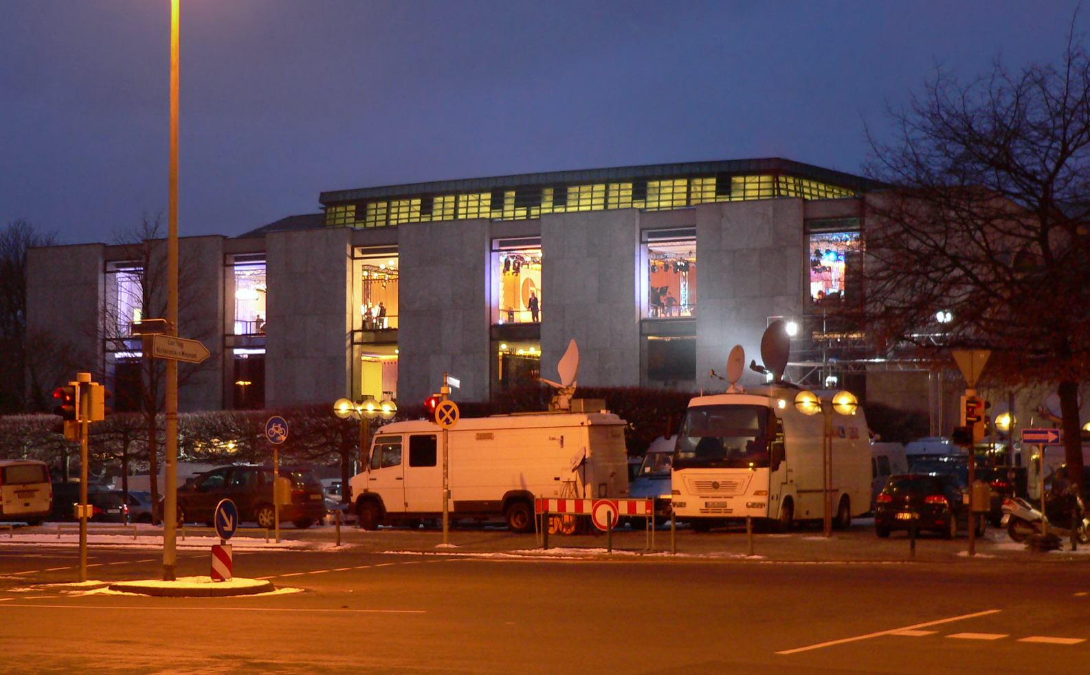 Landtagswahlen Niedersachsen 2013, Übertragungswagen vor Plenarsaal und Studios im Plenarsaal